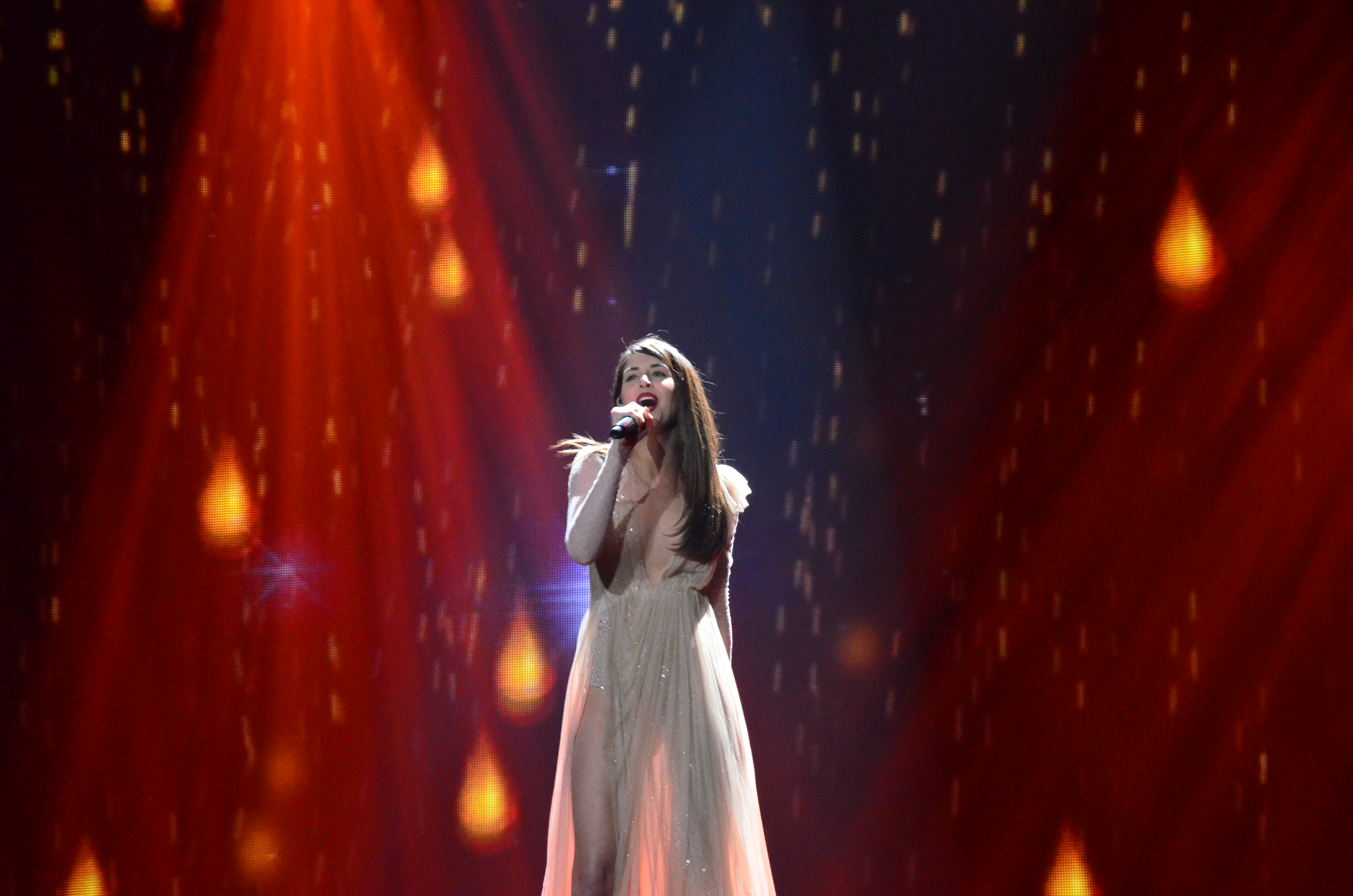 12 травня. Генеральна репетиція фіналу Євробачення 2017. Demy (Greece).